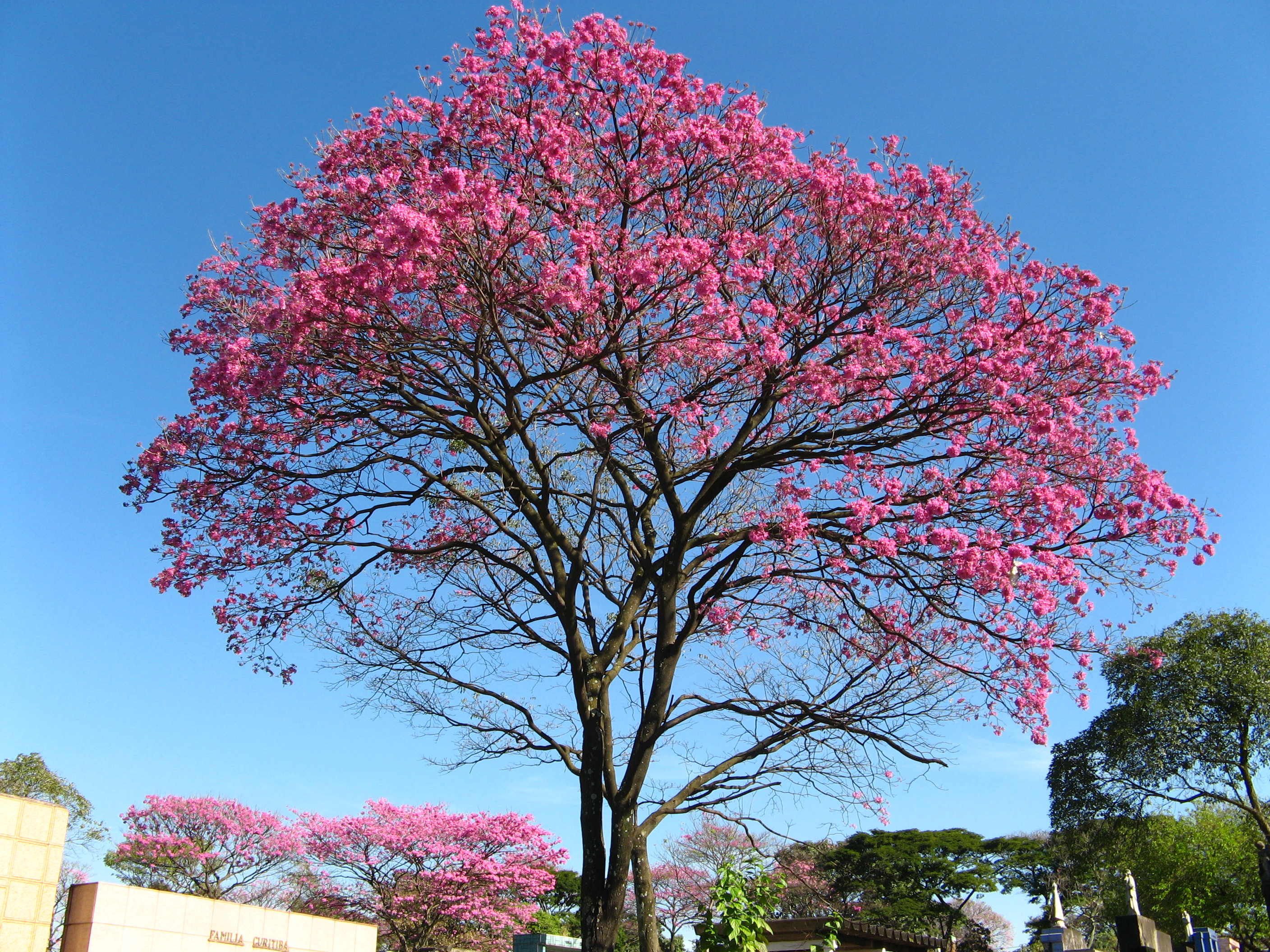 Ipê roxo (ype- tabebuia impetiginosa) trumpette tree- brazilian walnut - cemiterio quarta parada são paulo Brazil.